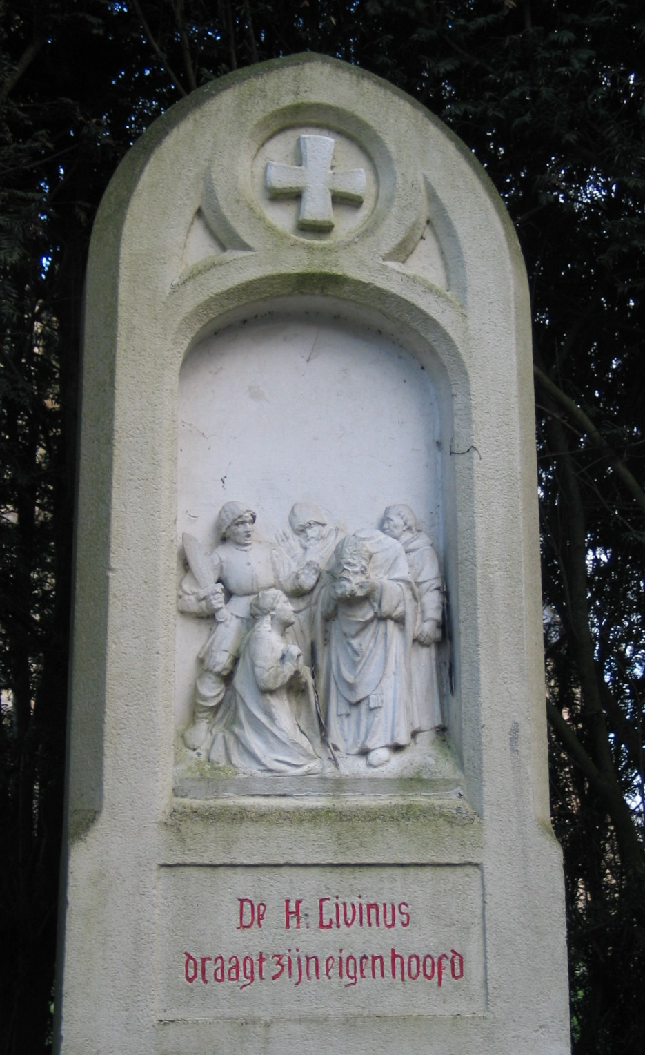 Livinus - eigen foto